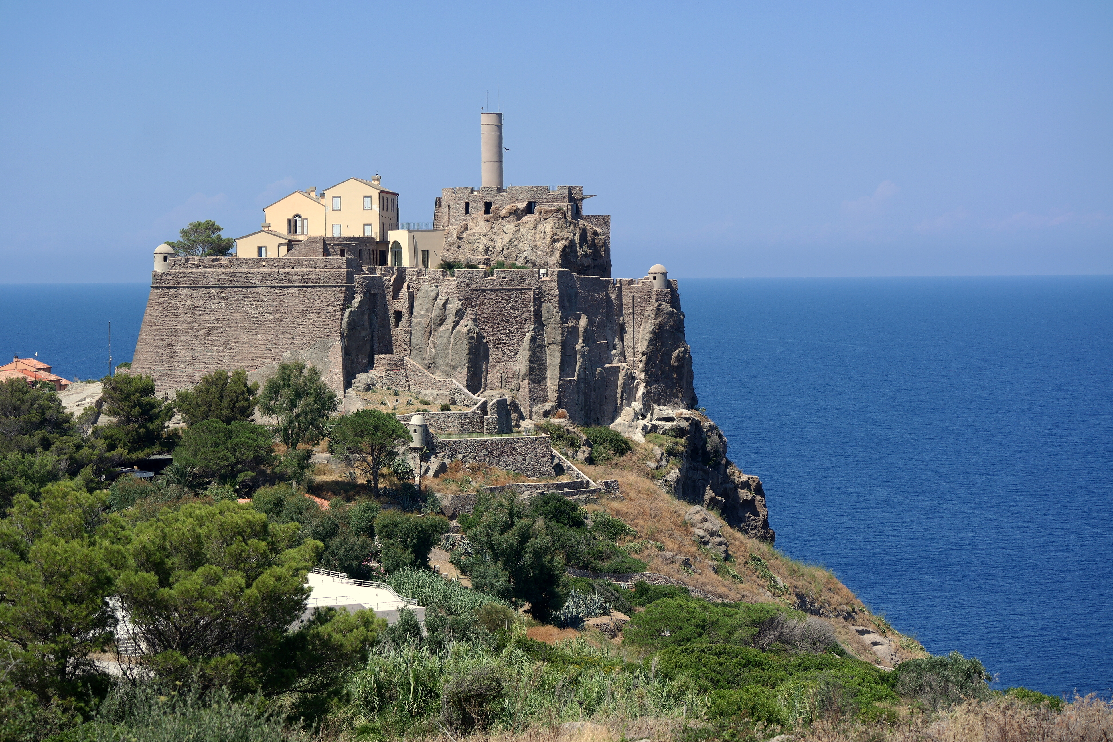 Veduta del Forte di San Giorgio sull'isola di Capraia